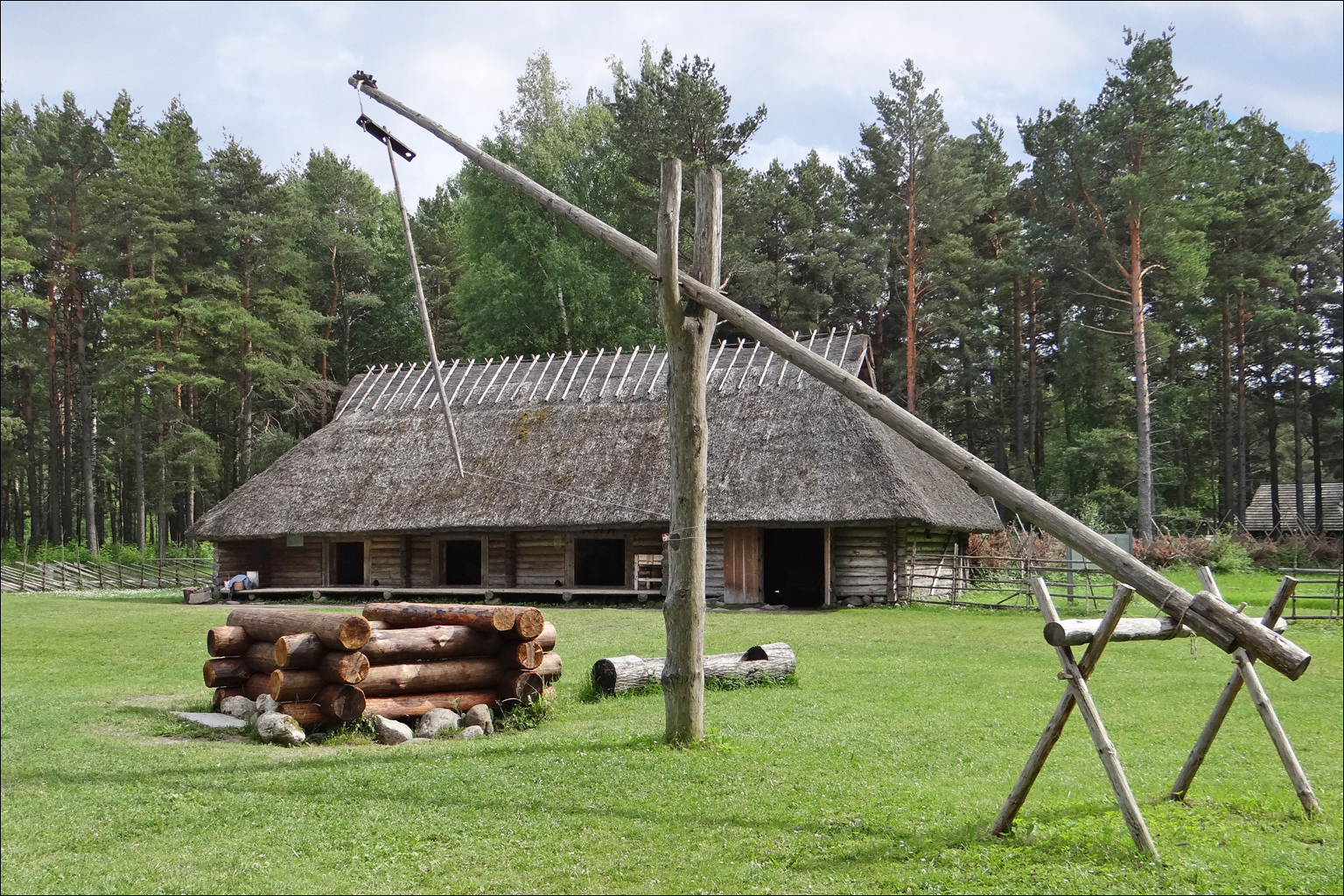 Bâtiment d'habitation Ferme (de taille moyenne) de Sassi-Jaani, du début du 19ème siècle à l'époque du servage, caractéristique de l'ouest de l'Estonie Site du musée ethnographique de plein air Ce musée ethnographique de plein air se trouve dans une zone très boisée située au bord de la Baltique. Il est bien organisé, chaque ferme est meublée et bien documentée. Néanmoins en raison de la taille de l'Estonie, les maisons se ressemblent un peu, ce qui le rend moins attractif que les musées de plein air scandinaves. Il est conseillé de le visiter en vélo (locations possibles à l'entrée) en raison des distances importantes entre les maisons. Il est également utile d'apporter un produit de protection contre les moustiques qui sont très nombreux en forêt.